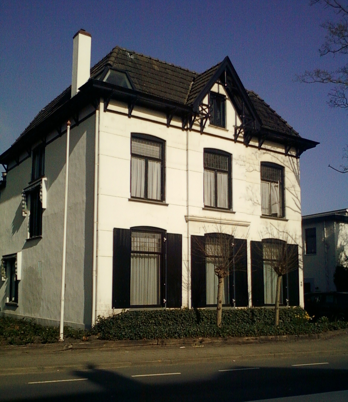 Het huis waar Piet Mondriaan van 1880 tot 1892 heeft gewoond.